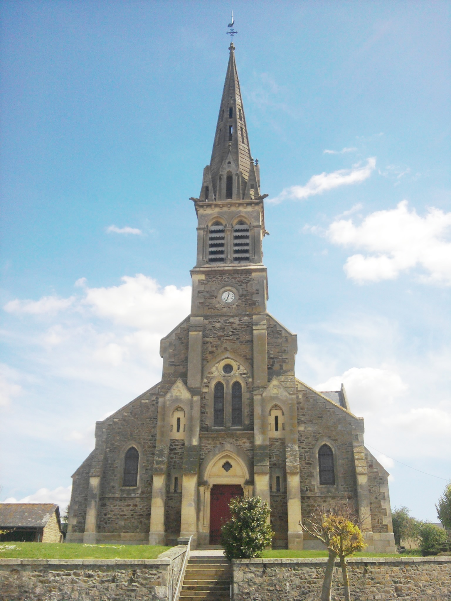 La façade de l'Église Saint-Sébastien de Noyal (Côtes-d'Armor), France